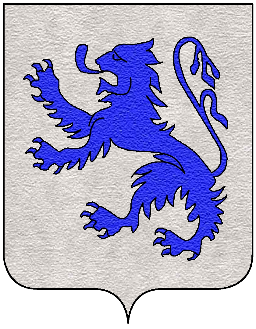 Stemma della famiglia Acciaioli